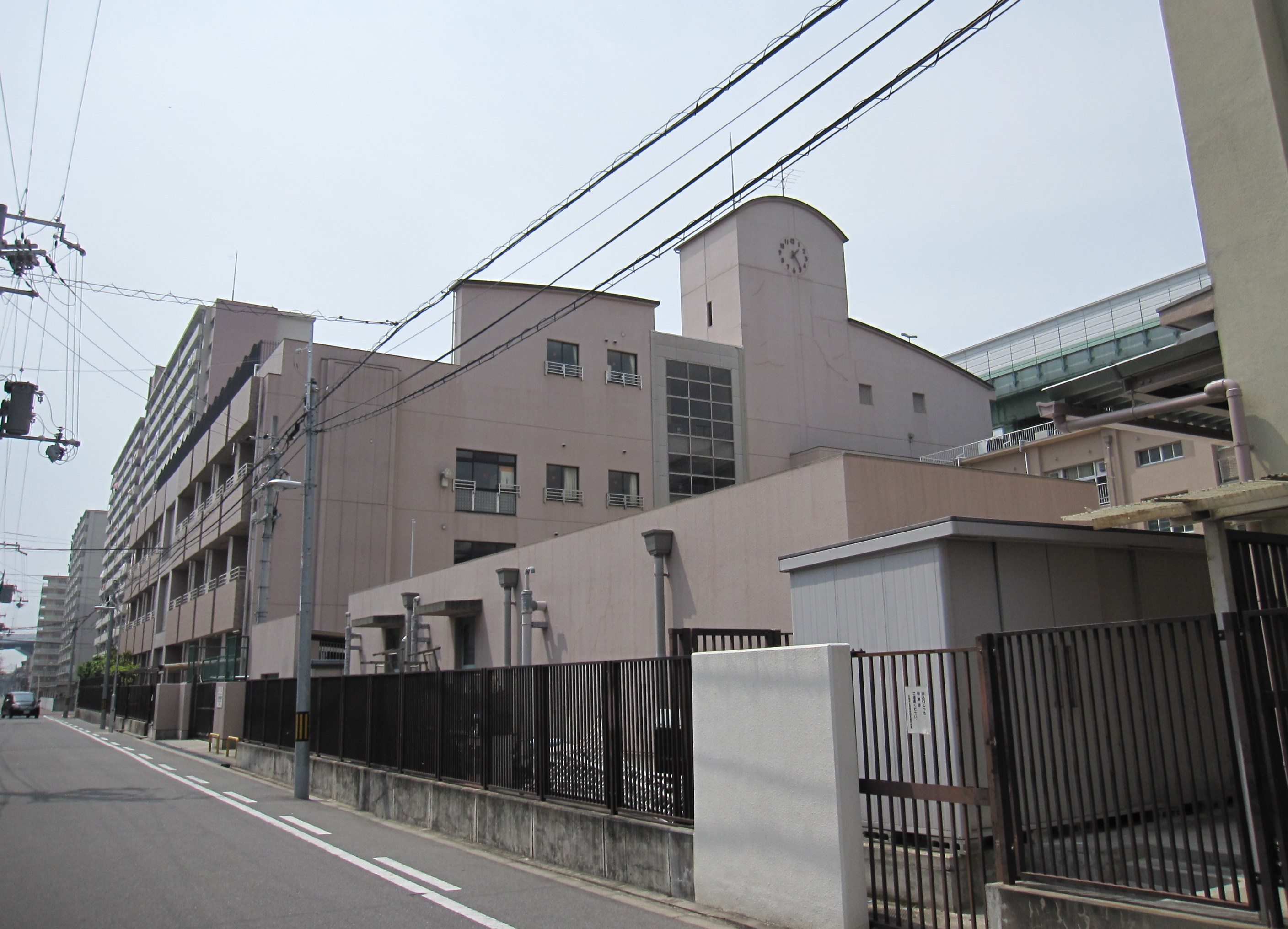 大阪市立思斉特別支援学校